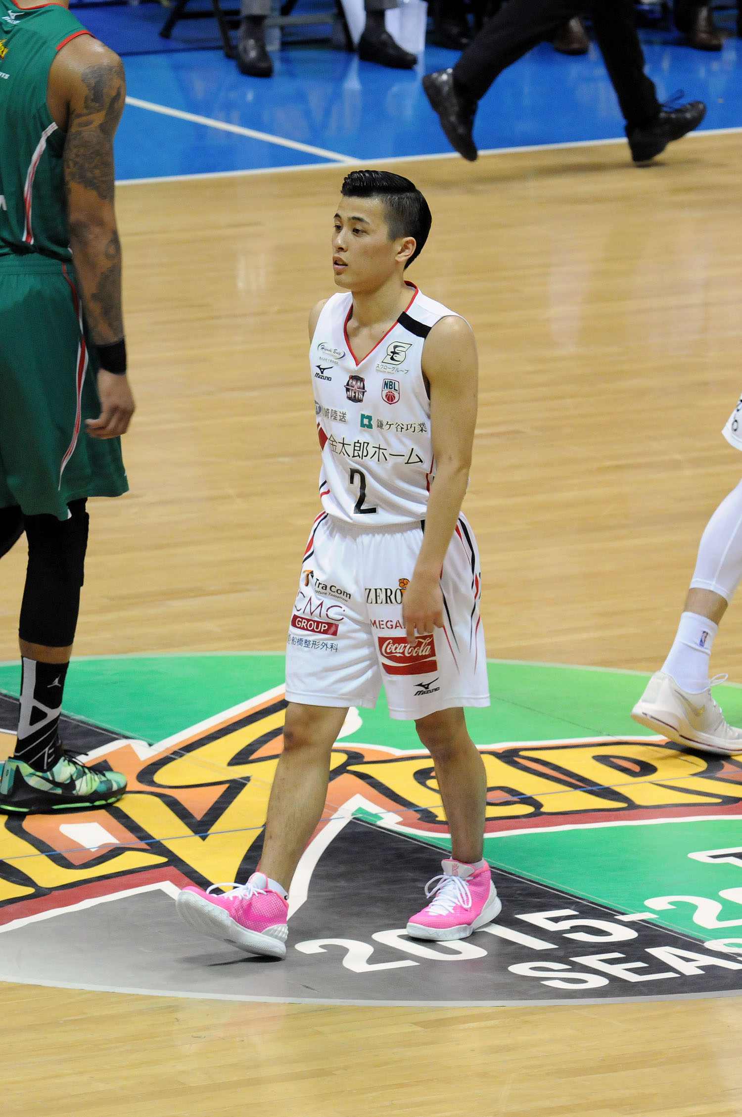 千葉ジェッツ、富樫勇樹選手。国立代々木競技場第二体育館で。